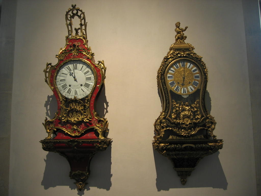 Musée du Temps de Besançon - Franche Comté - France